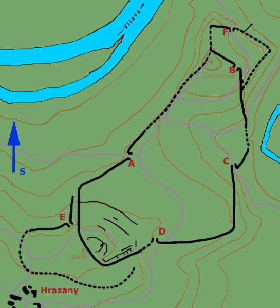 A,B,C,D,E,F - Brány GPS - 49°43'45.52"N,14°23'49.15"E Autor:cs:Wikipedista:Koky